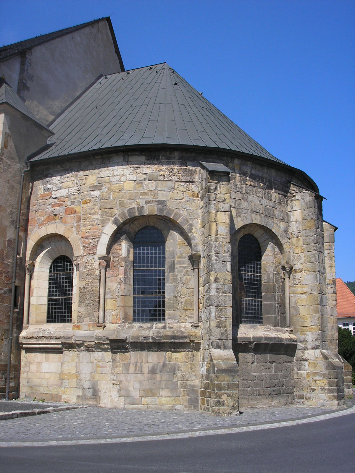 Die Apsis der Stadtkirche in Creuzburg (Thüringen).